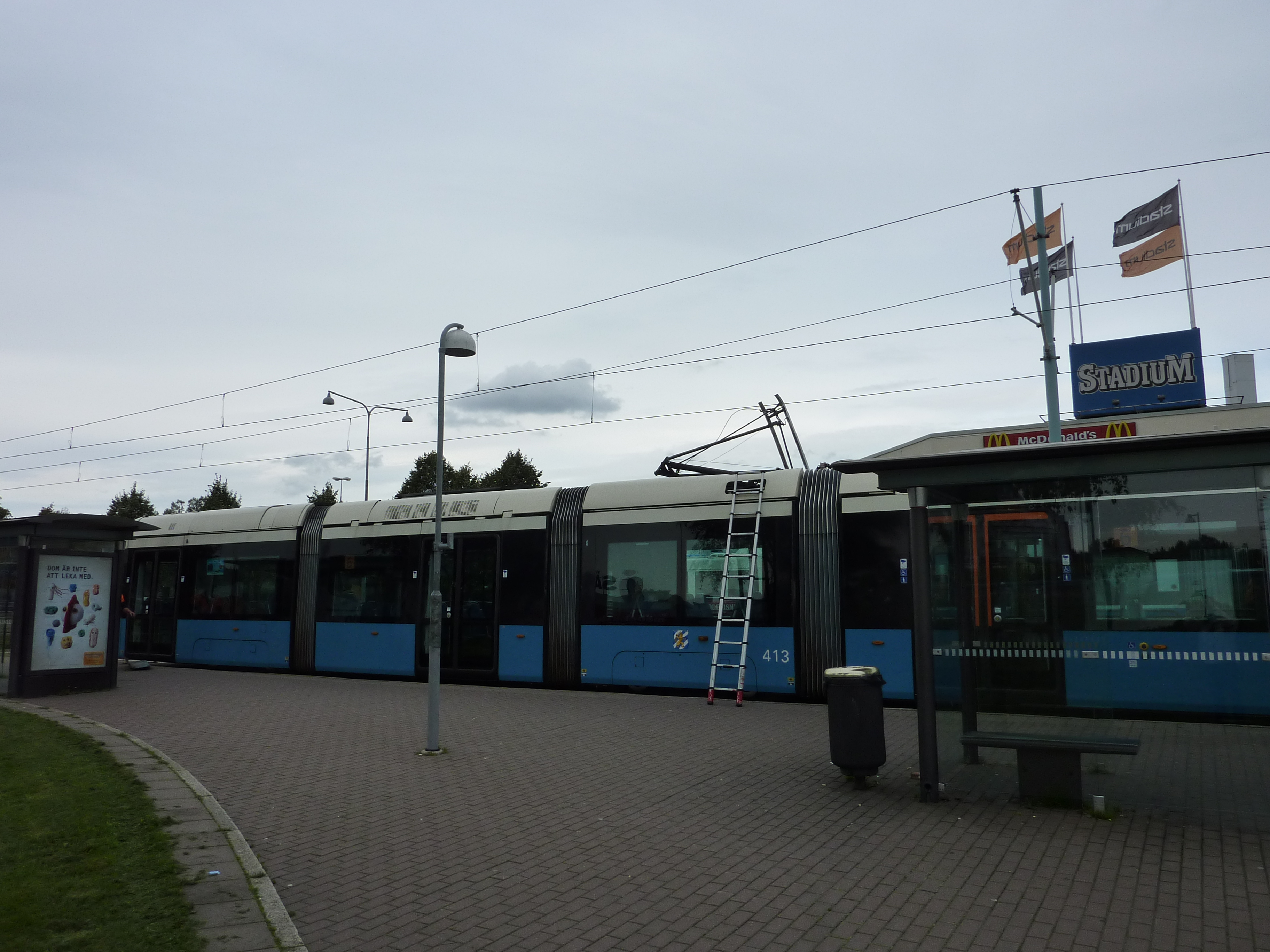 Sirio spårvagnen 413 har fått ett Bygelhaveri på Hjalmar brantingplatsen.